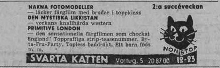 Bioannons för Svarta Katten i DN 1965-12-27